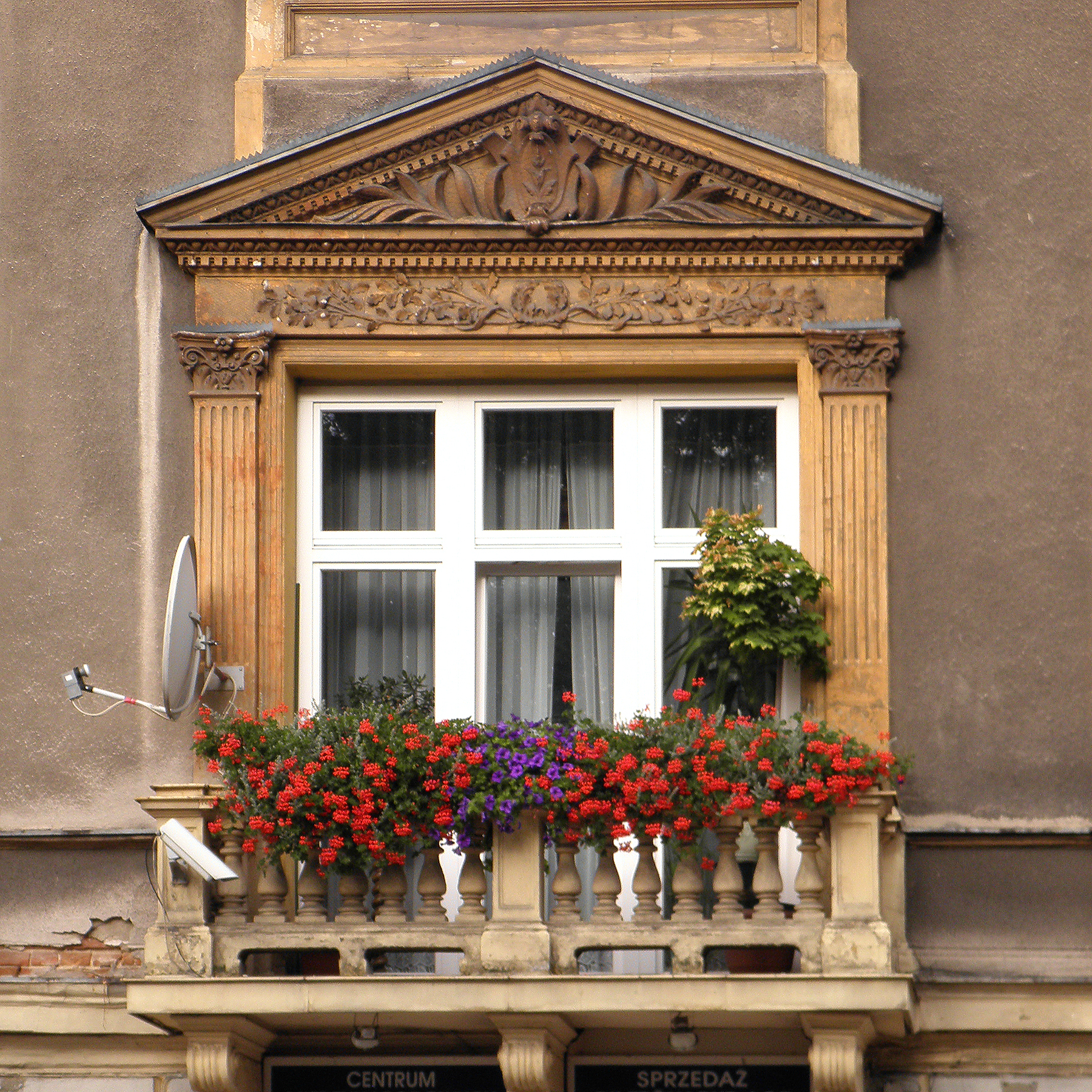 Radom - dawny pałac Karschów, fragment elewacji frontowej.